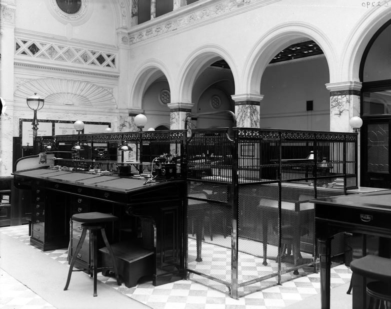 Interiör från Stockholms Intecknings-Garanti-aktiebolag på Fredsgatan Tid: 1903 - 1910. Sedan 1982 är det Medelhavsmuseet som använder lokalen.